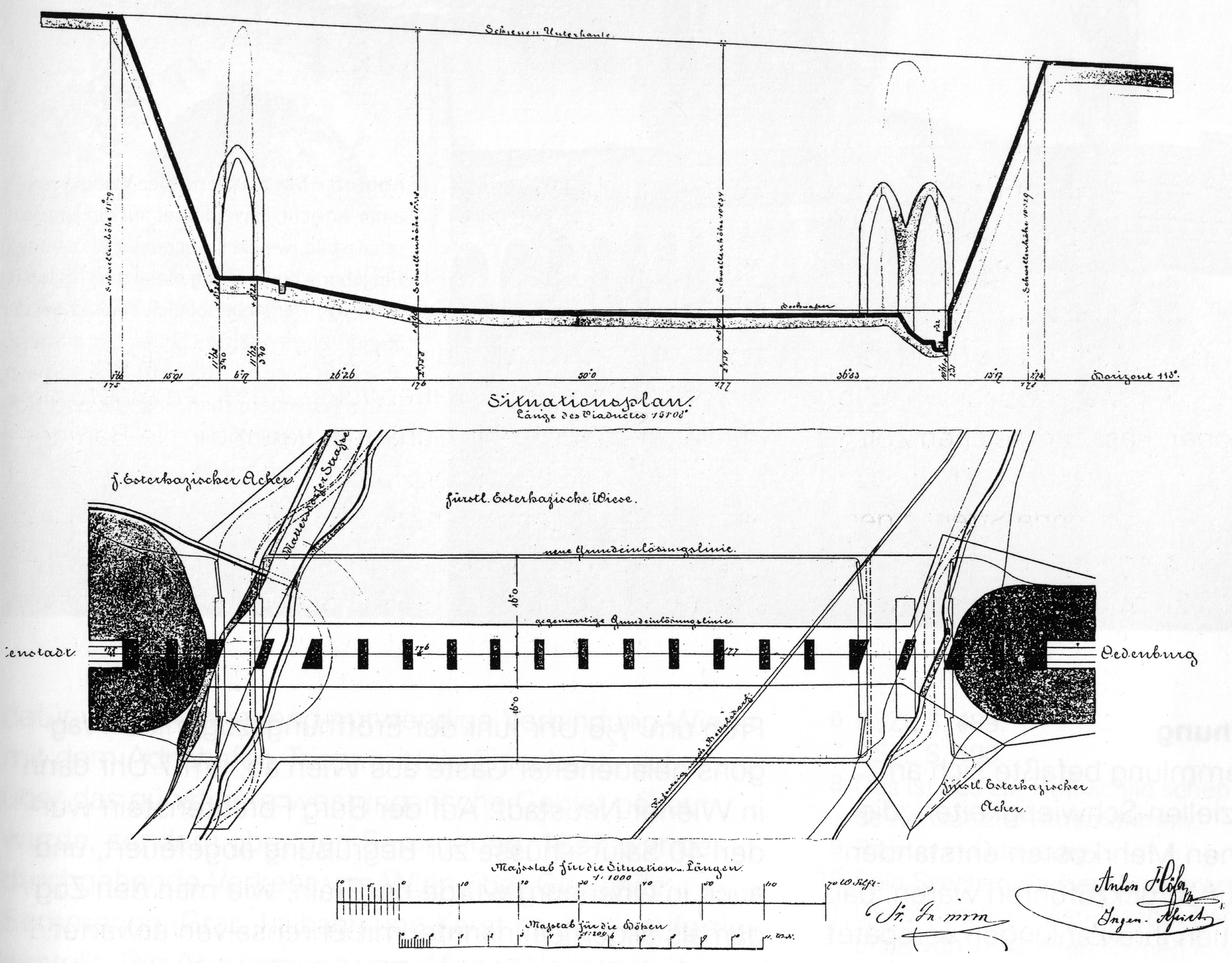 Mattersburg, Bahnviadukt, Vermessungszeichnung (vor 1847)